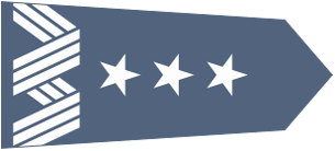 Naramiennik generała broni lotnictwa